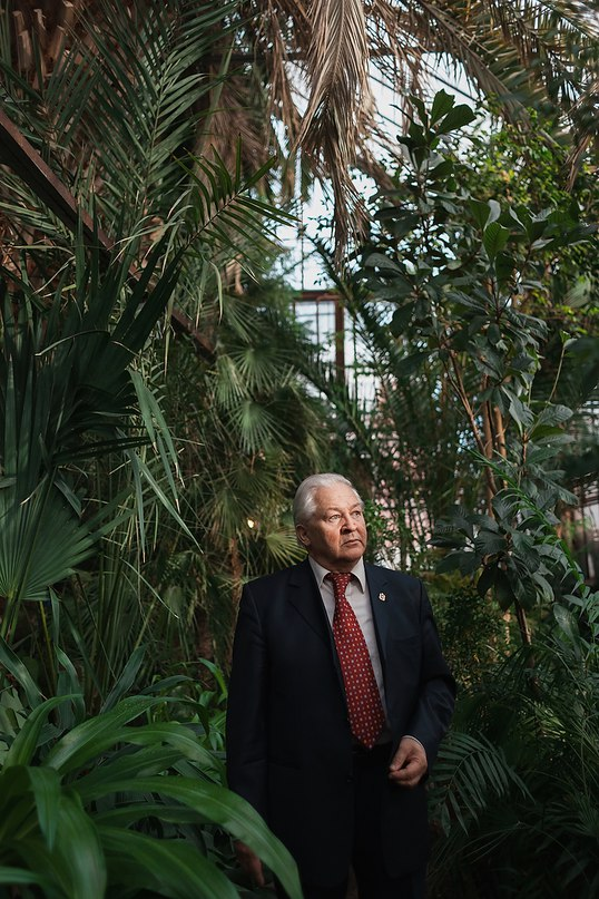 Президент, ex-ректор. Пермский университет.